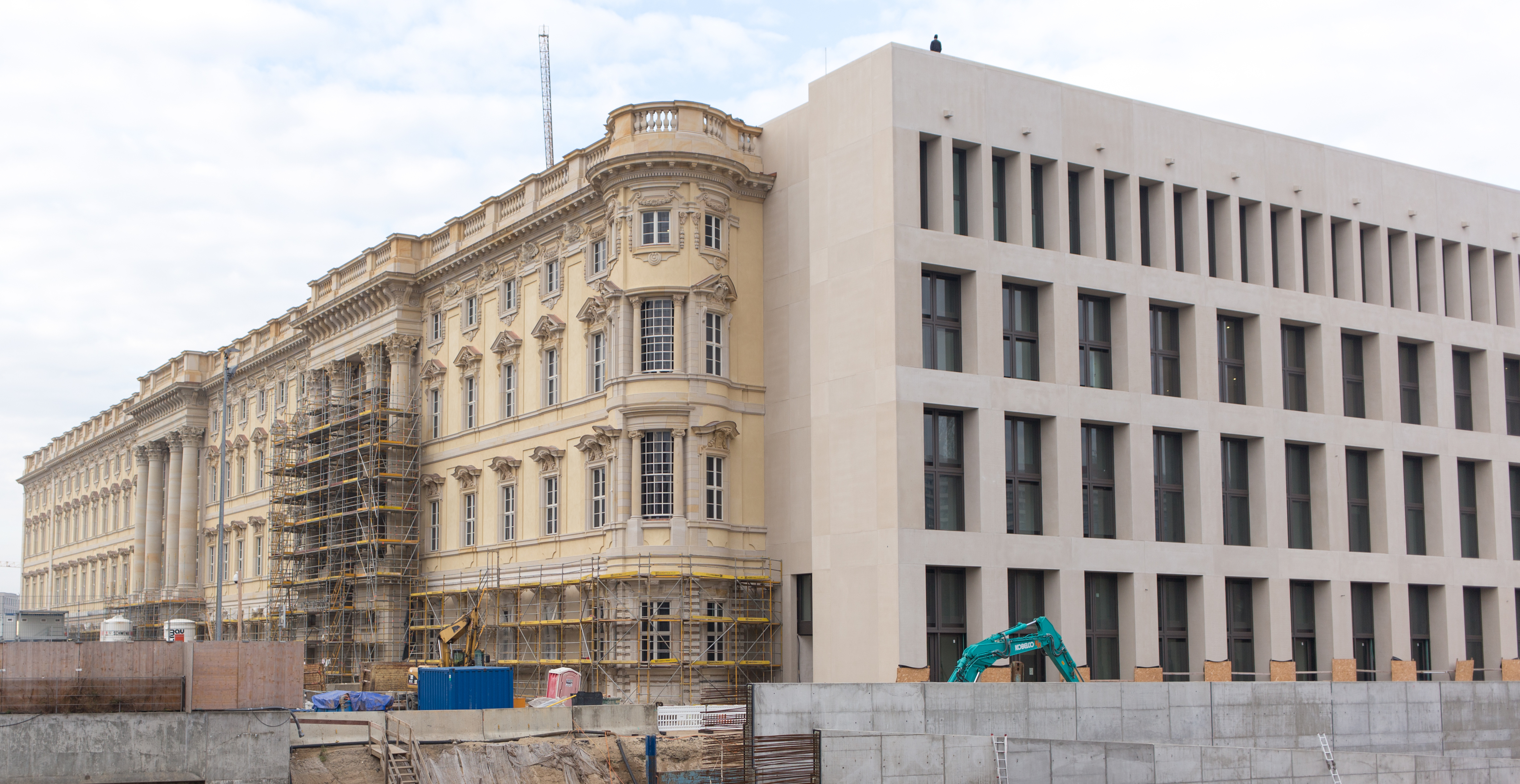 Wikipedia KulTour im Humboldt Forum